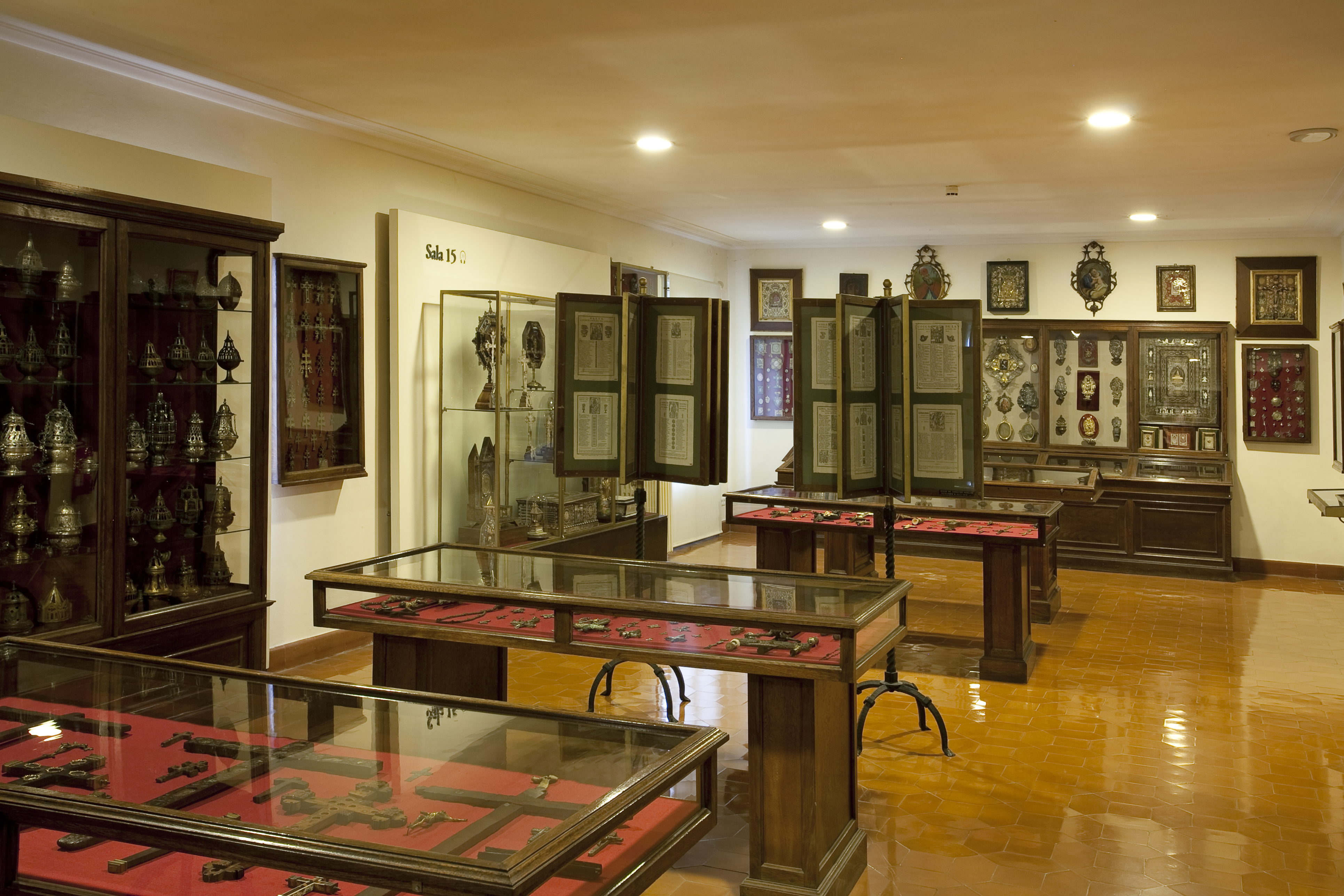 Fe Gabinet col·leccionista - Fot. GUILLEM F-H.jpg